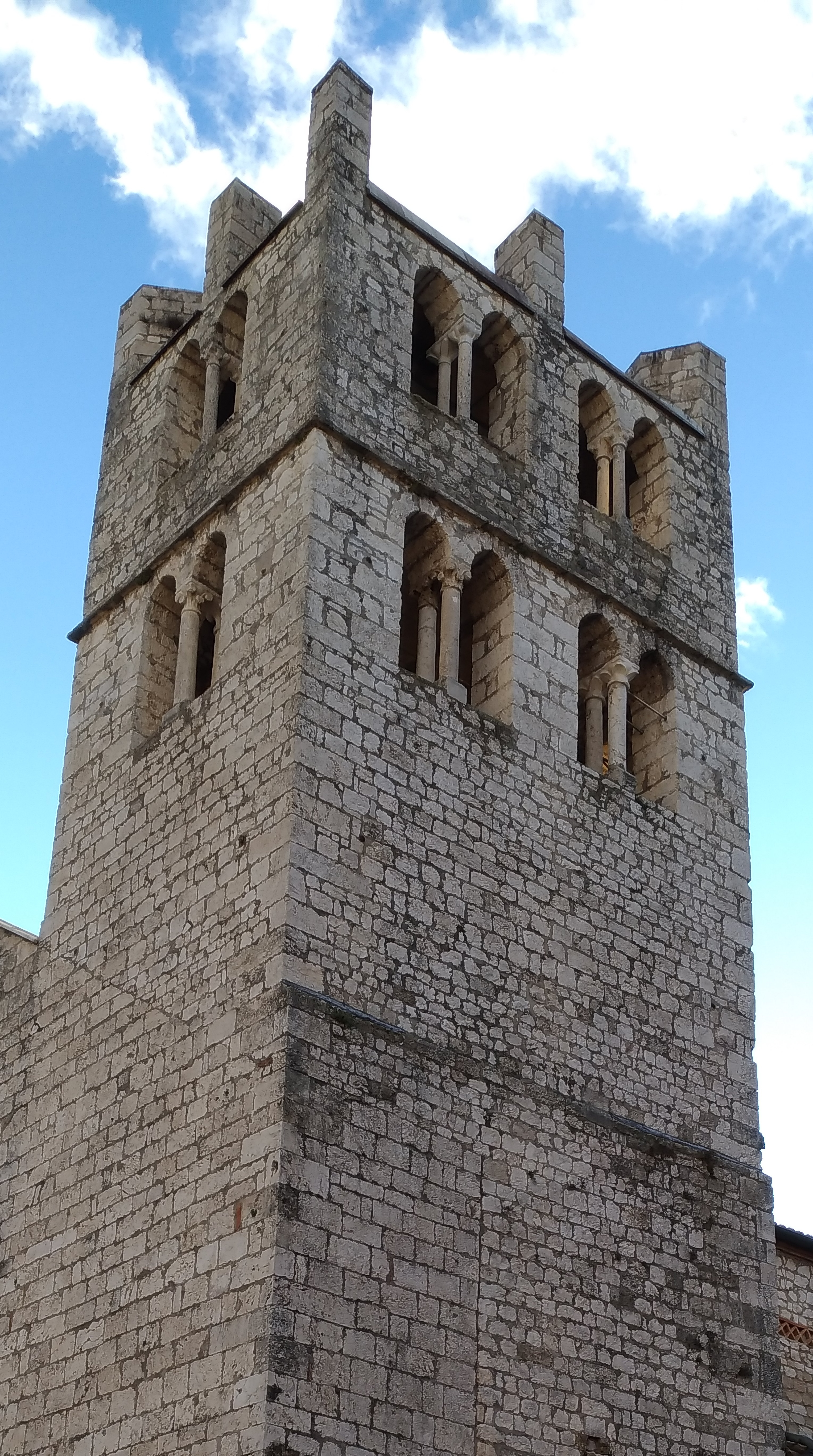 Campanile di Santa Maria Maggiore (Alatri)